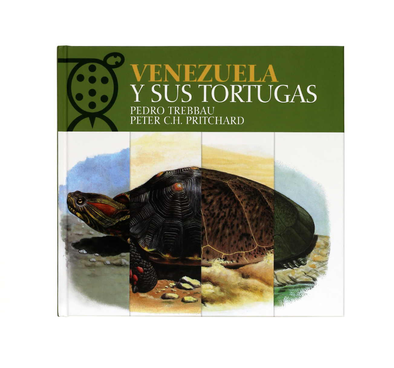 Portada del libro Venezuela y sus tortugas.